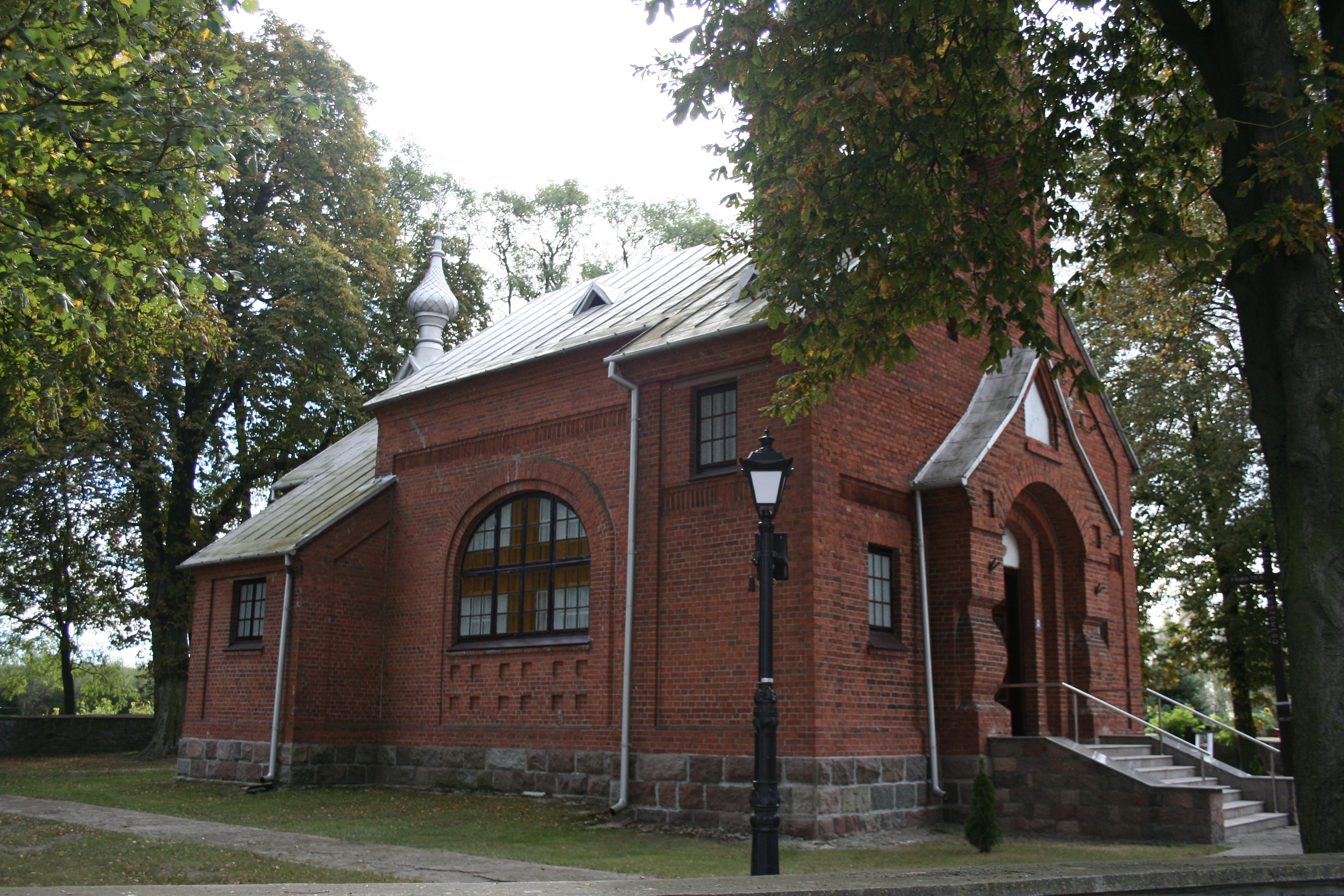 Cerkiew prawosławna, ob. kościół rzym.-kat. p.w. Ścięcia św. Jana Chrzciciela, 1914 oraz ogrodzenie Mszanna